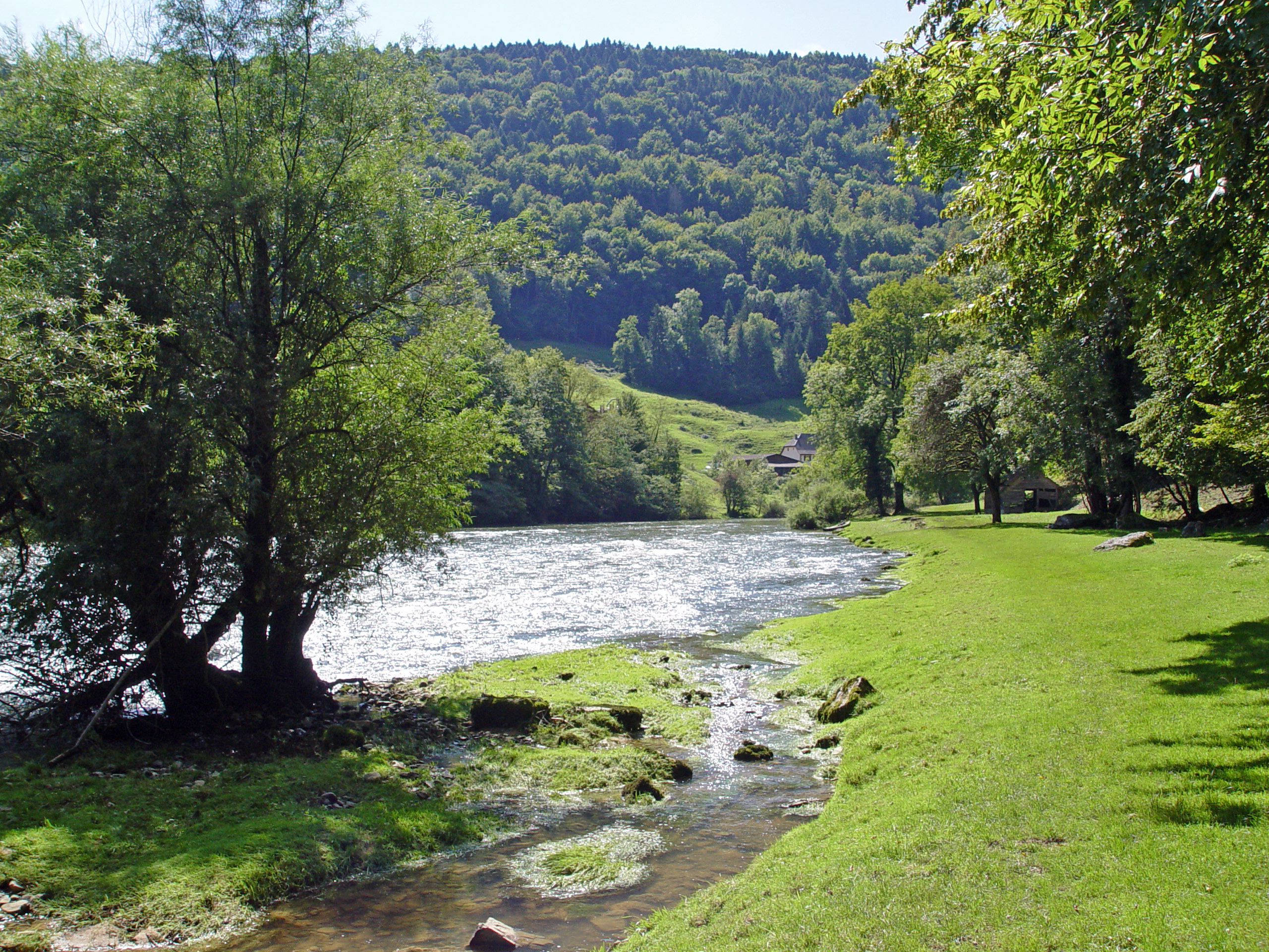 Le Doubs auf der Strecke zwischen Soubey uns Saint-Ursanne (4 Kilometer westlich von Soubey)